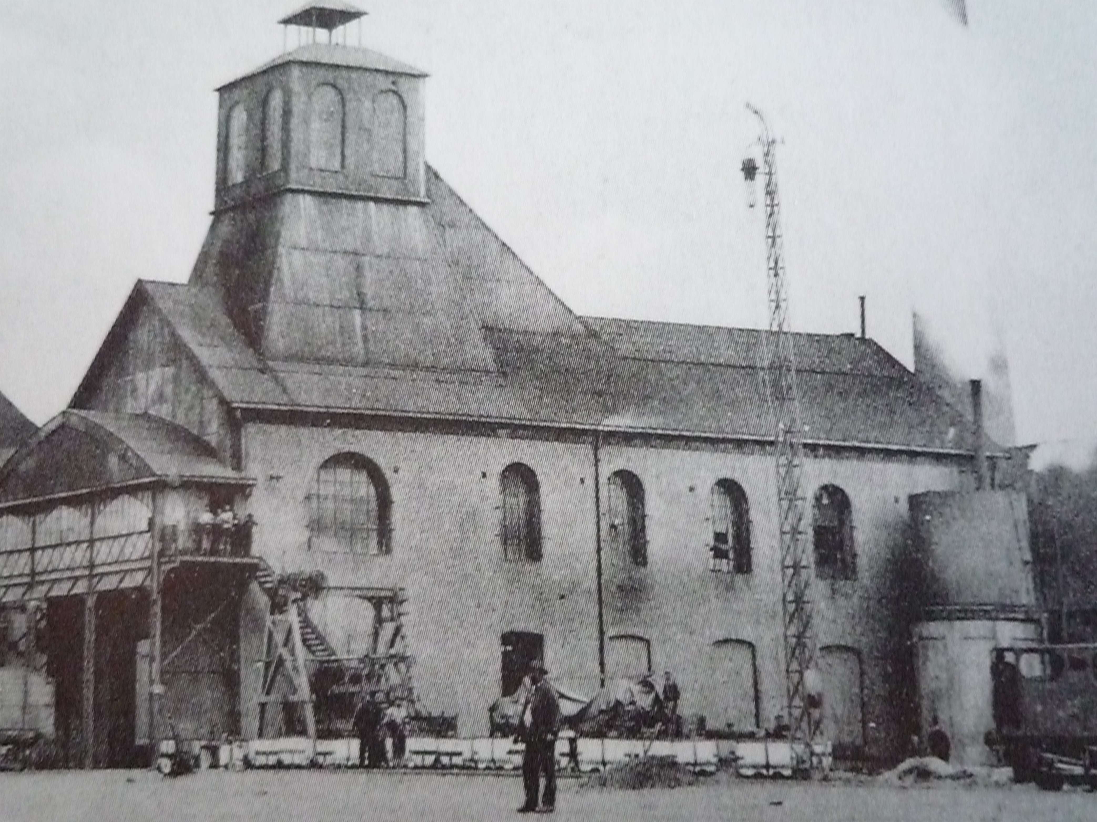 La Fosse n° 5 - 5 bis de la Compagnie des mines de Nœux était un charbonnage constitué de deux puits situé à Barlin, Pas-de-Calais, Nord-Pas-de-Calais, France.